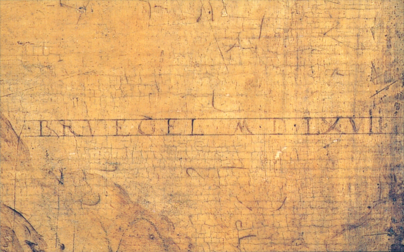 BRVEGEL M.D.LXVII (BRUEGEL 1567) Signatur des Gemäldes Die Bekehrung des Paulus (Bekehrung Pauli) im Kunsthistorischen Museum